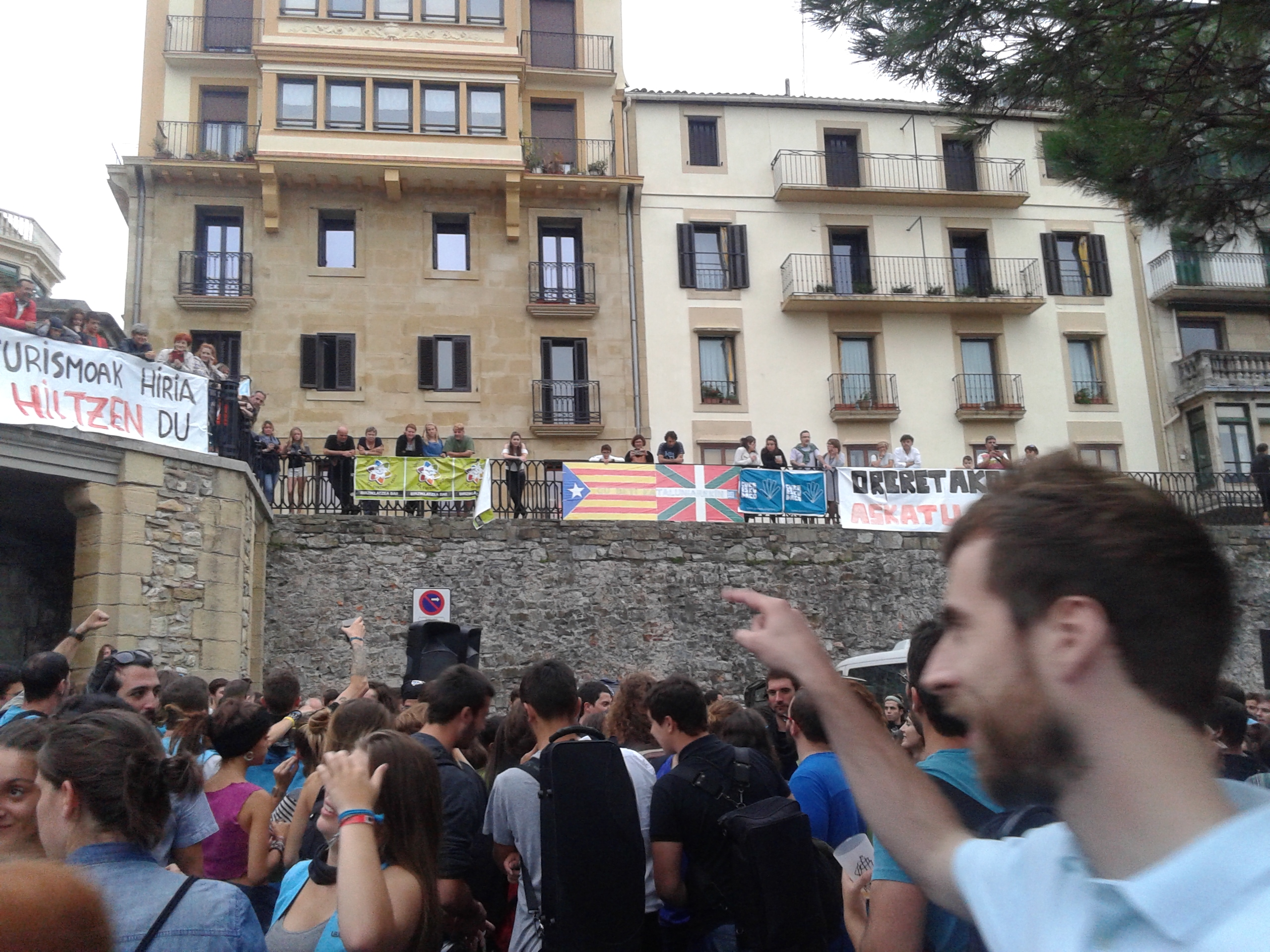 Kaian inguru festiboa sortzen dute piratek Aste Nagusian.